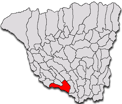 Categorie:Hărţi ale judeţului Gorj